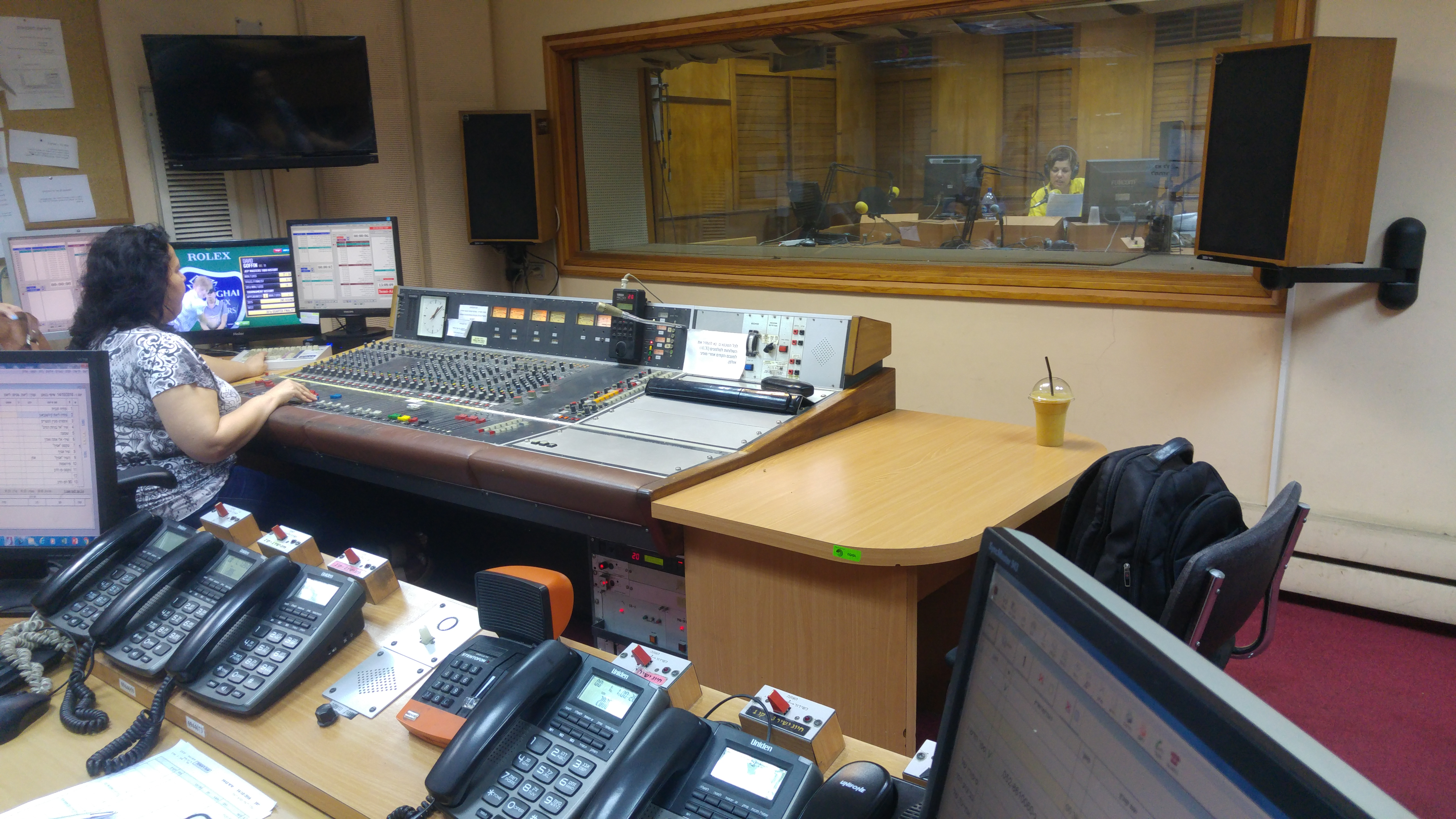 מתחם רשות השידור בתל אביב, ליד הקריה ומתחם שרונה.